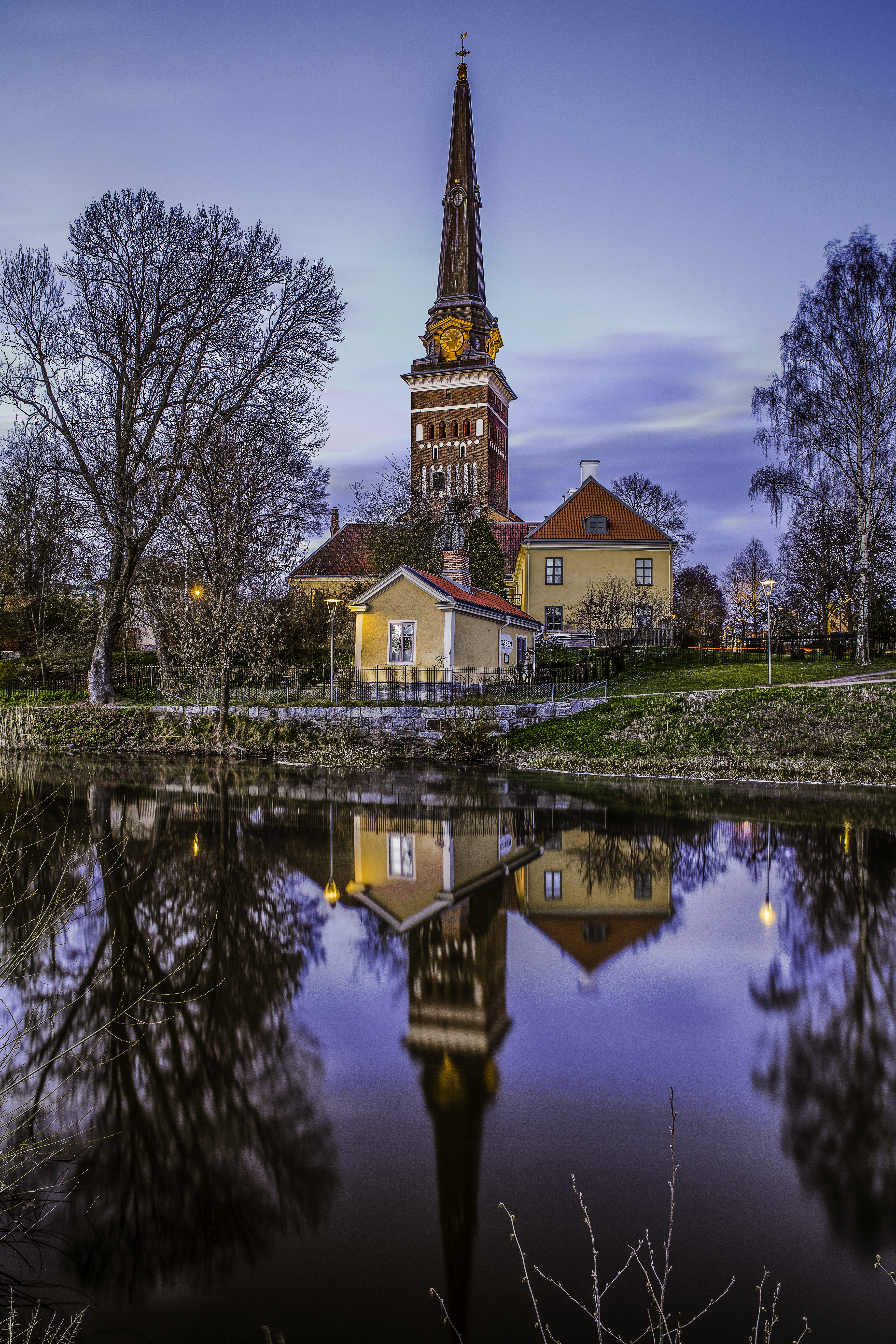 Västerås domkyrka (Domkyrkan 1)